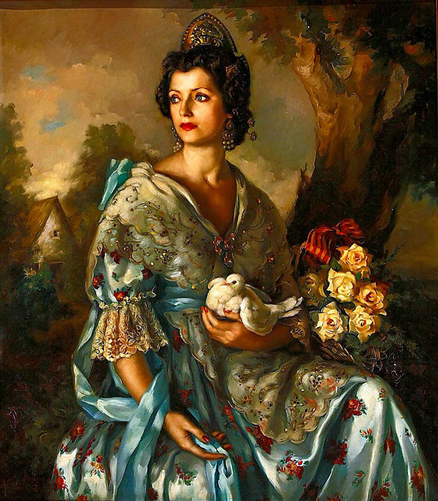 Pintura d'una gitana catalana